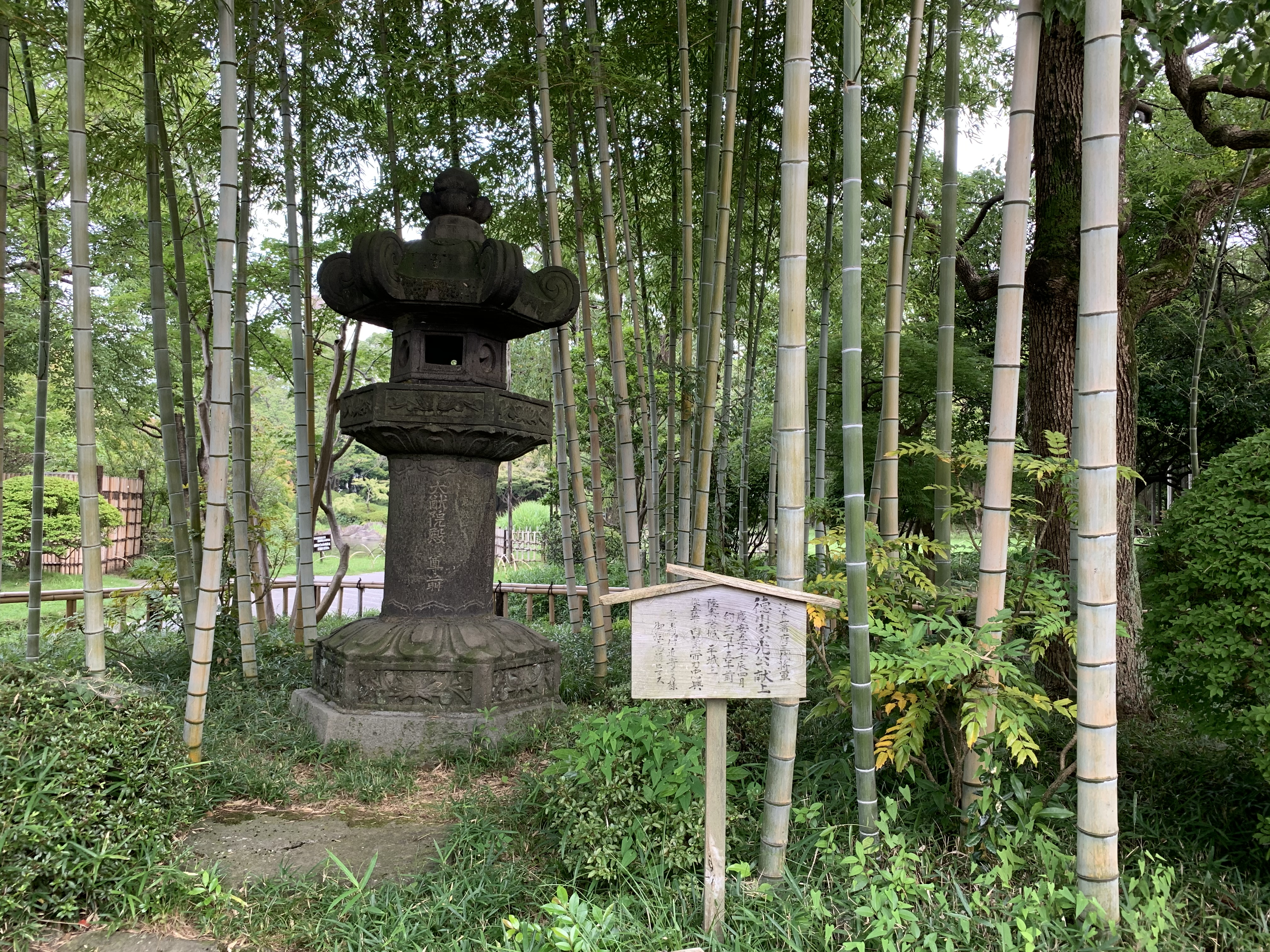 東京都江戸川区行船公園内にある、「徳川家光公献上灯篭」。慶安5年（1652）、陸奥磐城の城主・内藤帯刀忠興が、江戸幕府三代将軍・徳川家光に献上したと伝わる。